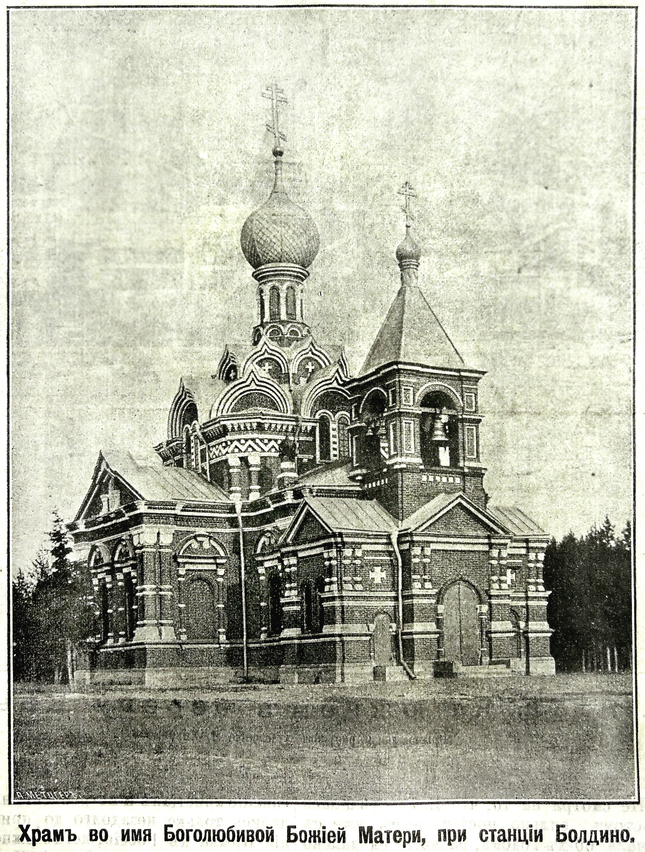 Болдино. Церковь Боголюбской иконы Божией Матери Иллюстрированное прибавление к газете "Московский Листок" 1895 г. Россия, Владимирская область.